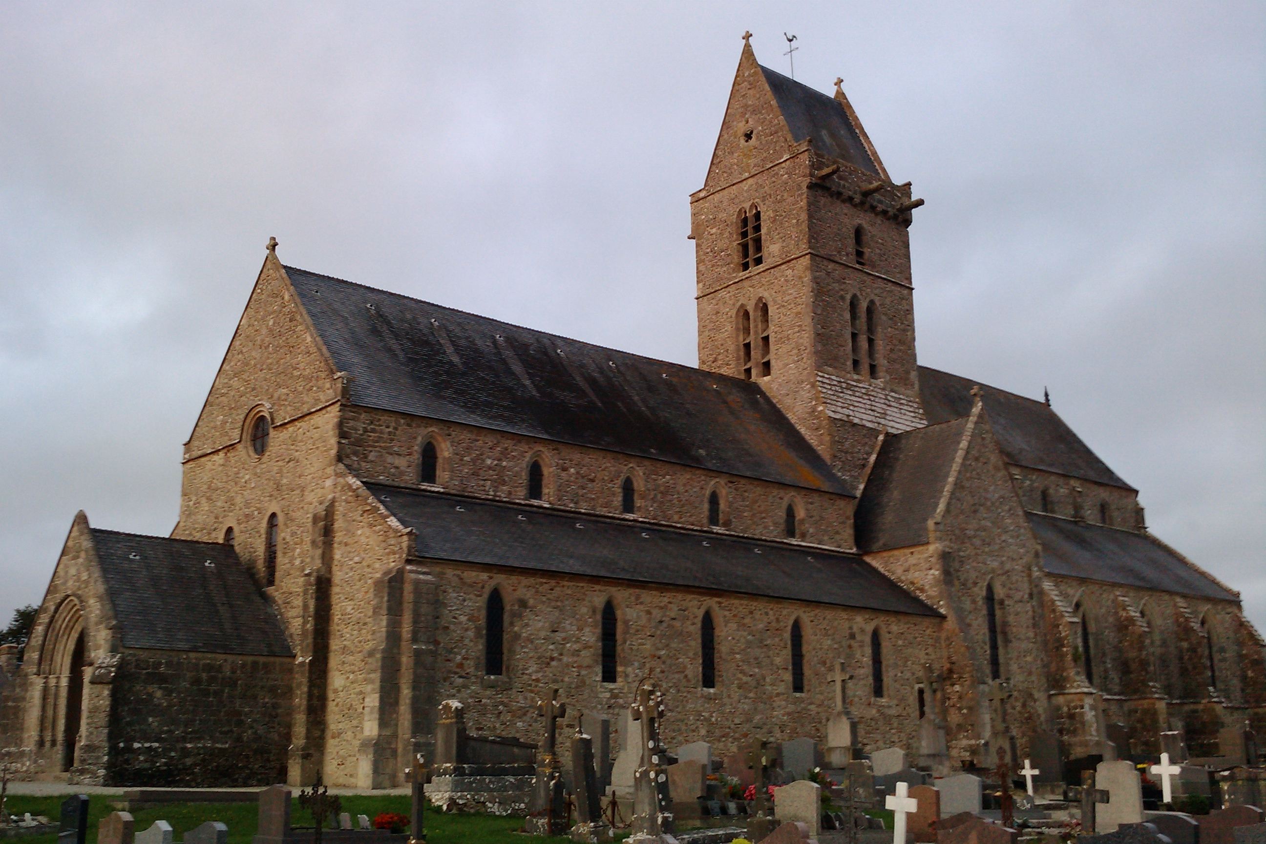 Eglise Saint-Pierre de Vesly (Manche)